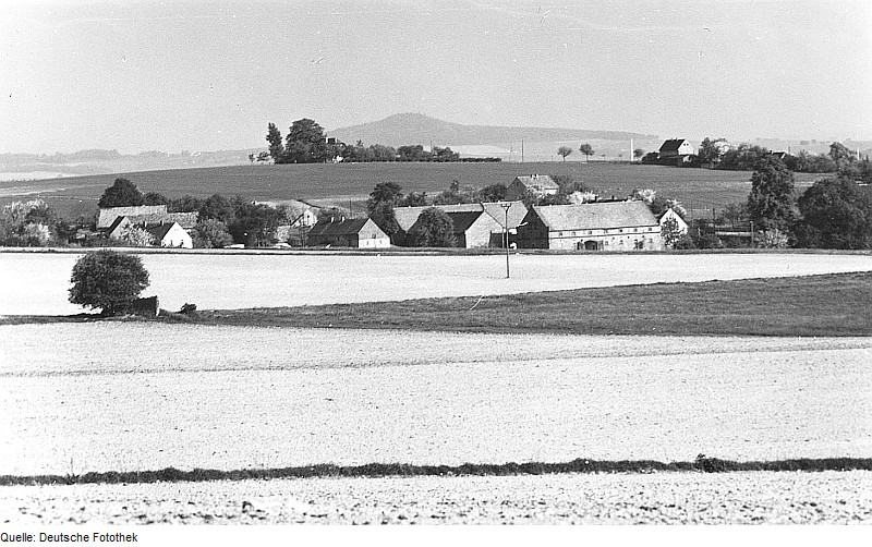 Original image description from the Deutsche Fotothek Reichenbach/O.L.-Mengelsdorf. Blick über das Dorf zum Windmühlenberg